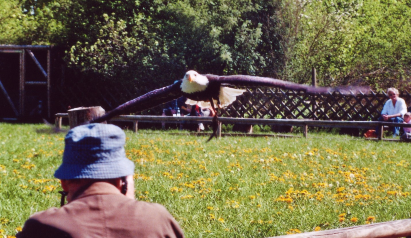 Weißkopfseeadler (Haliaeetus leucocephalus) im Wildpark Poing